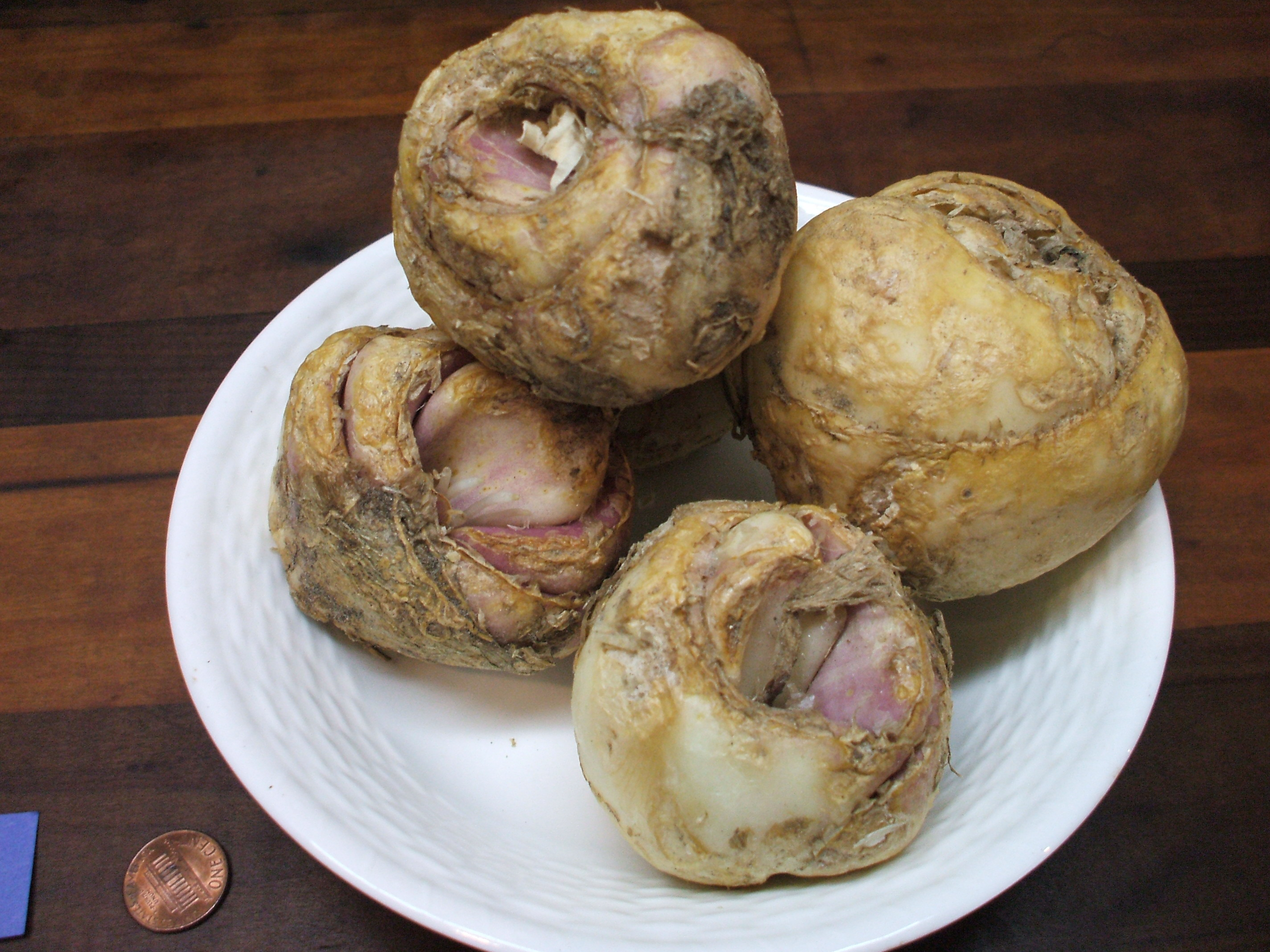 Fritillaria imperialis bulbes